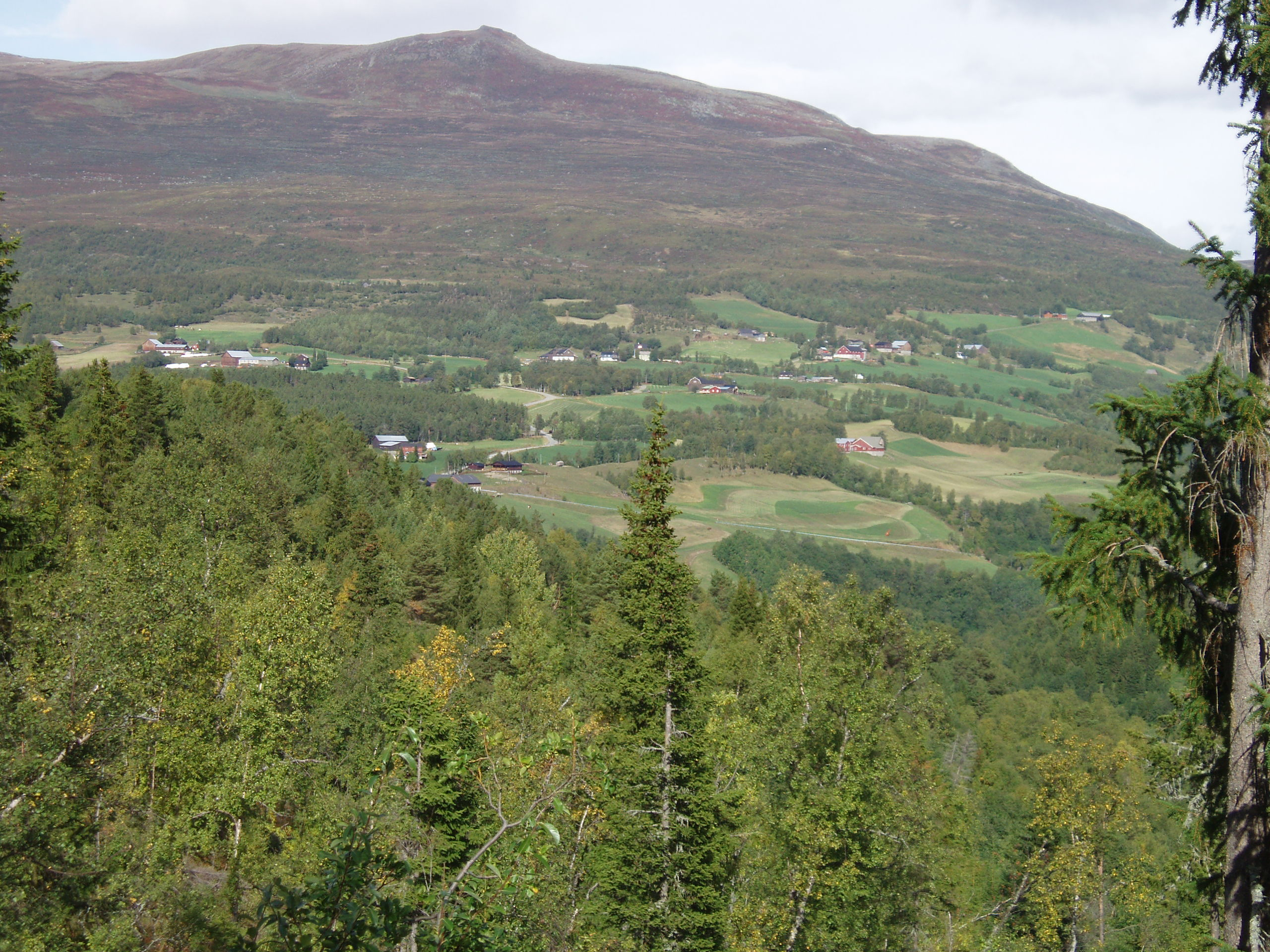 Skårvangen sett fra Nordheradslien.